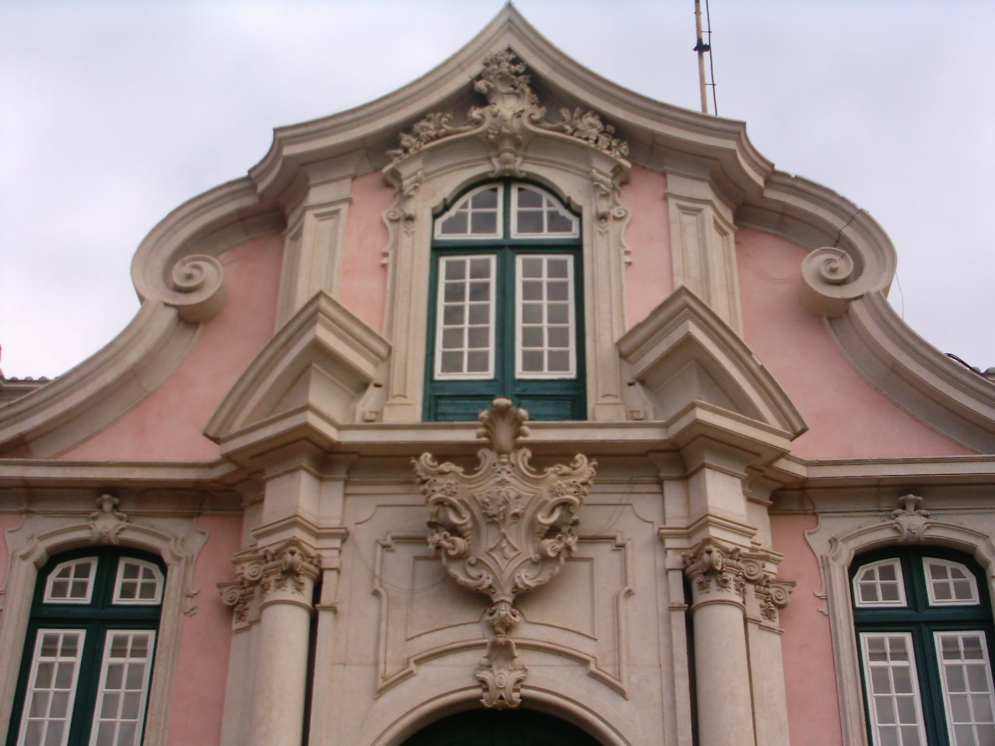 Palácio de Queluz, Portugal. Pormenor de fachada.